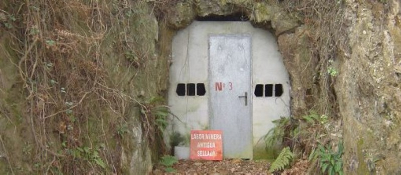 Galerías da antiga mina subterránea de Corcoesto (Cabana de Bergantiños)